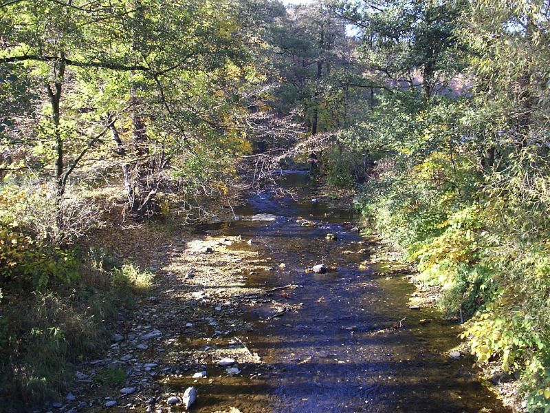 Řeka Bystřice v Hlubočkách